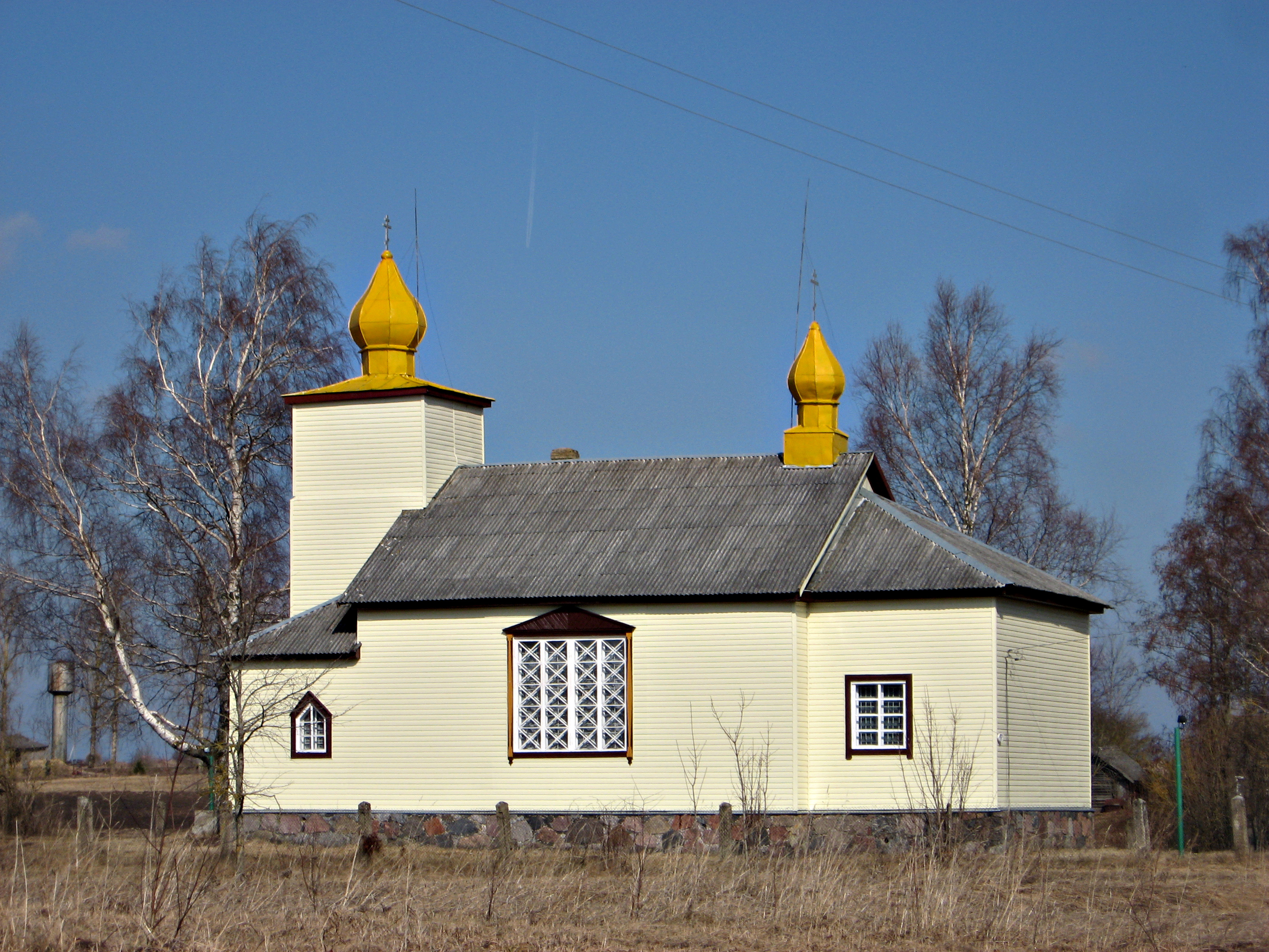 церковь в Скангели